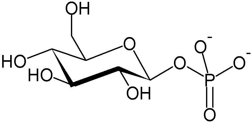 Glucose-1-phosphateの構造